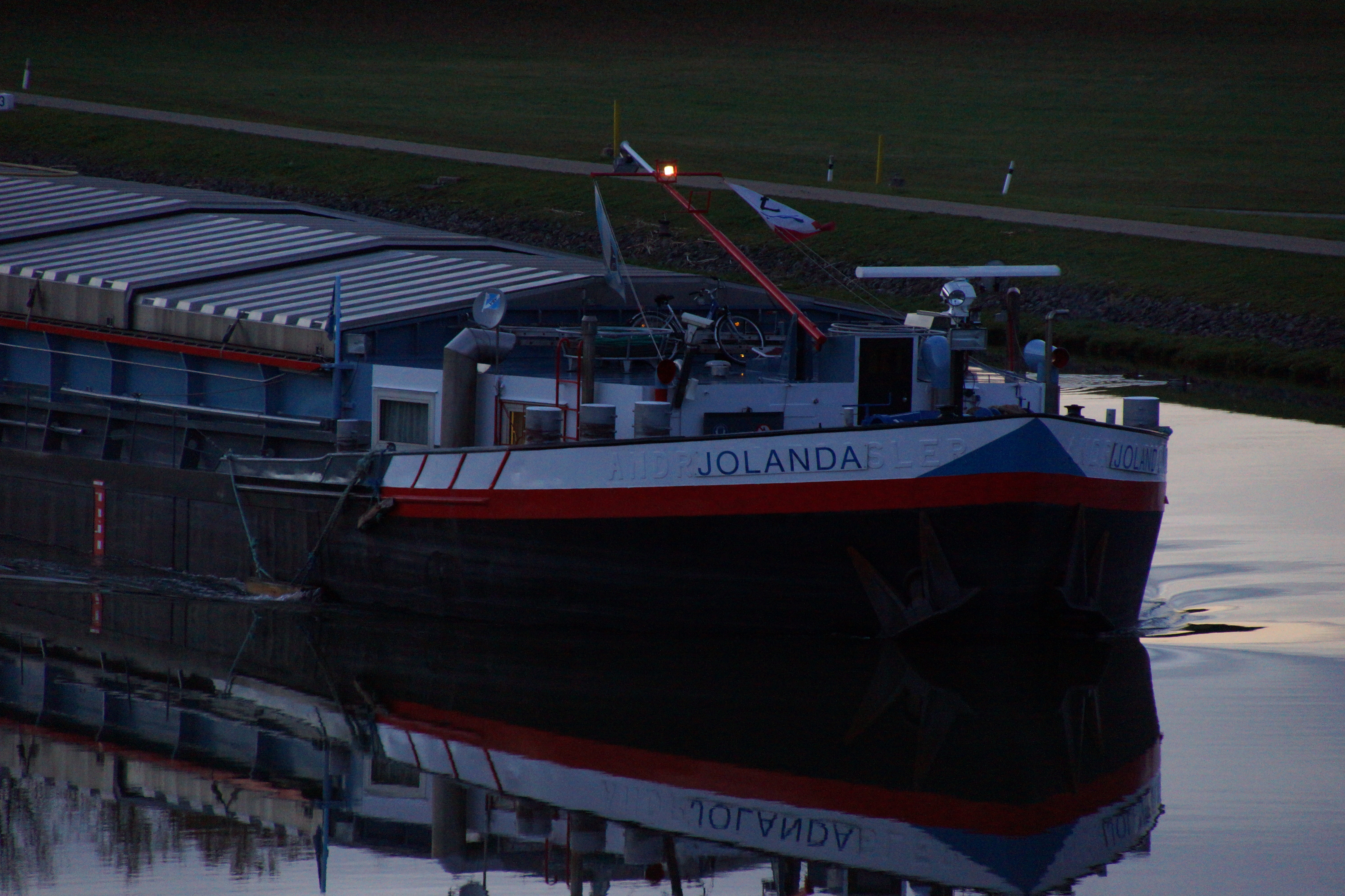 Der Main-Donaukanal bei Freystadt in der Oberpfalz: Das Binnenmotorschiff Jolanda